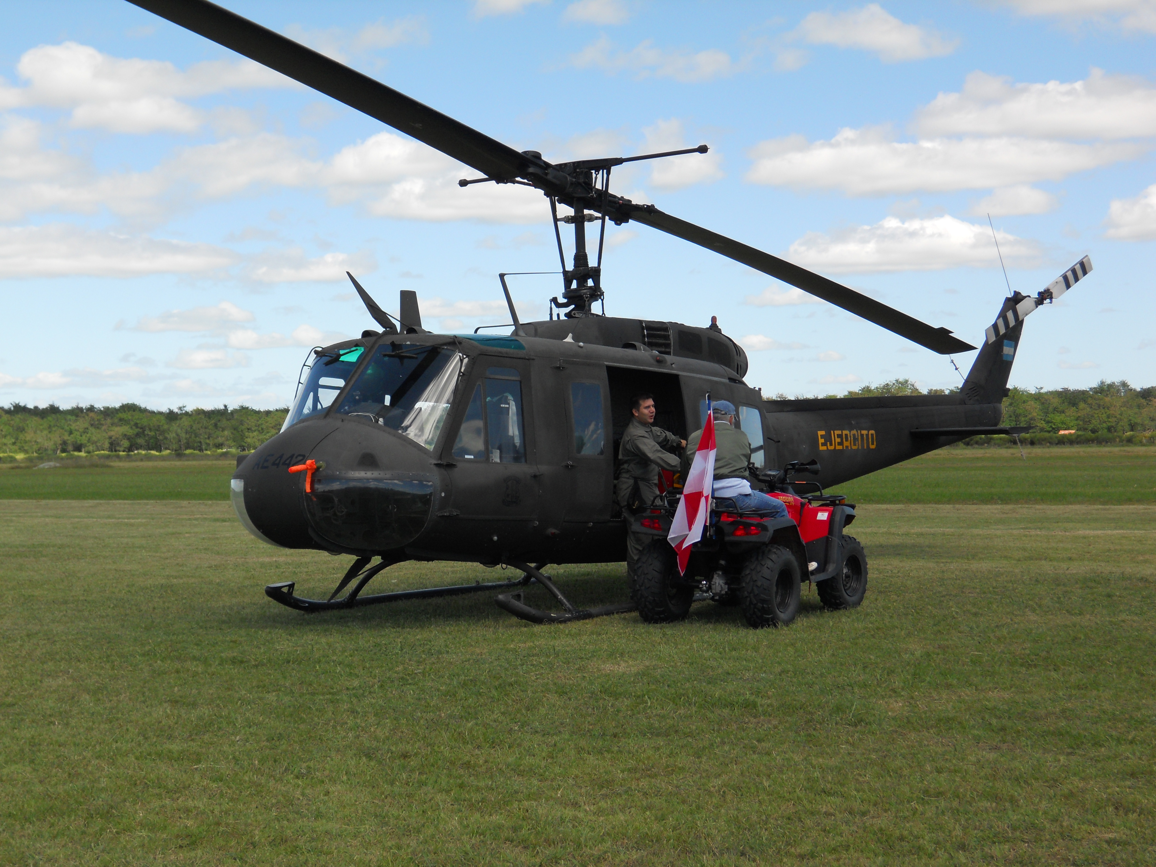 Bell UH-Huey del Ejercito Argentino